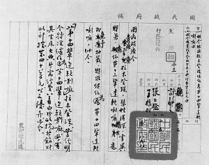 中文（中国大陆）: 国民政府批准第十四世达赖喇嘛坐床令